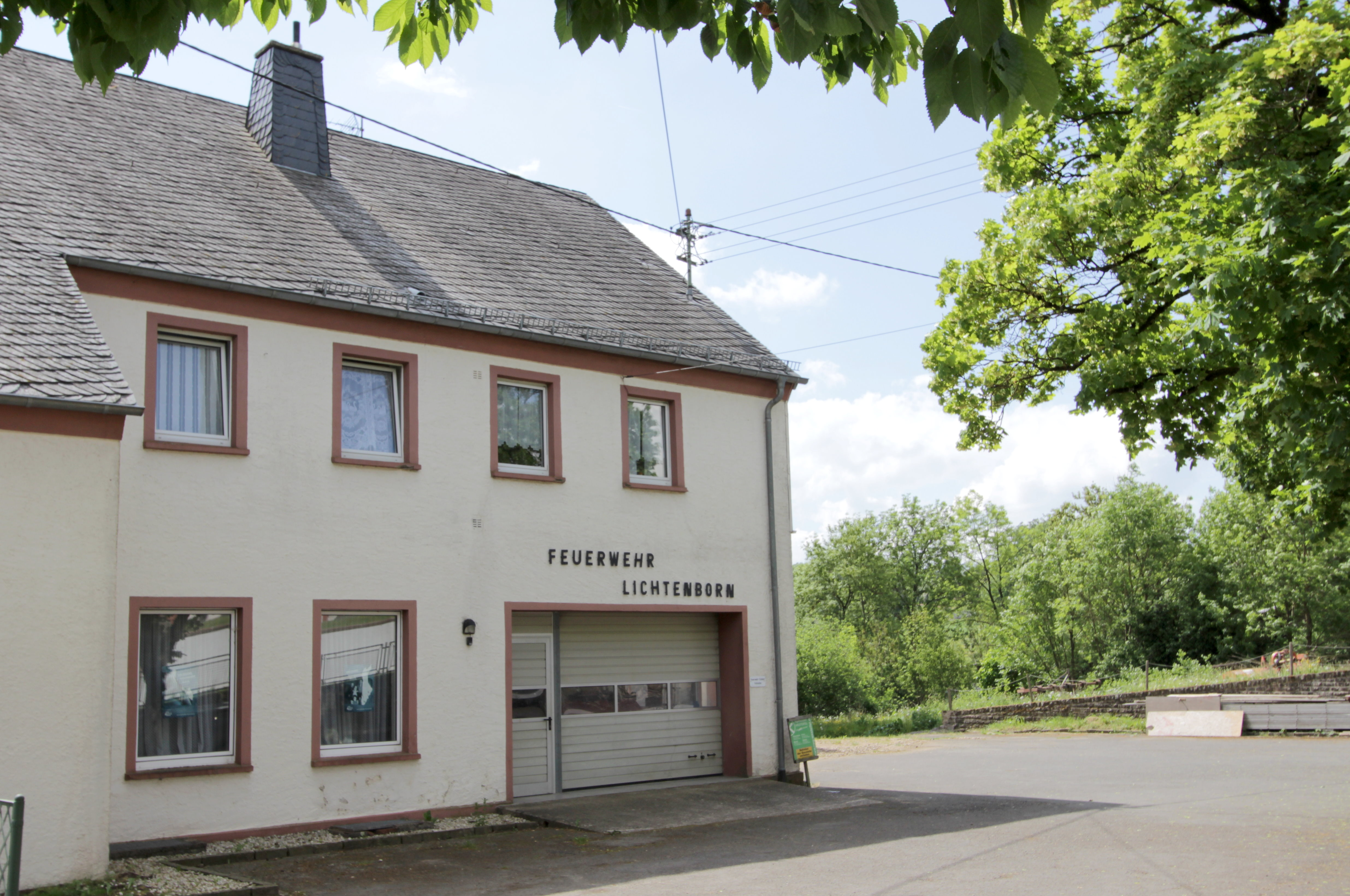 54619 Lichtenborn, Schulstraße 3. Feuerwehrhaus von Lichtenborn. Aufnahme vom 2018.